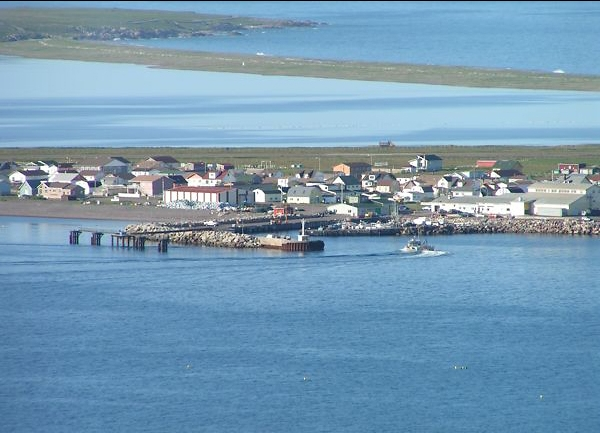 Port de Miquelon, vu du Cap